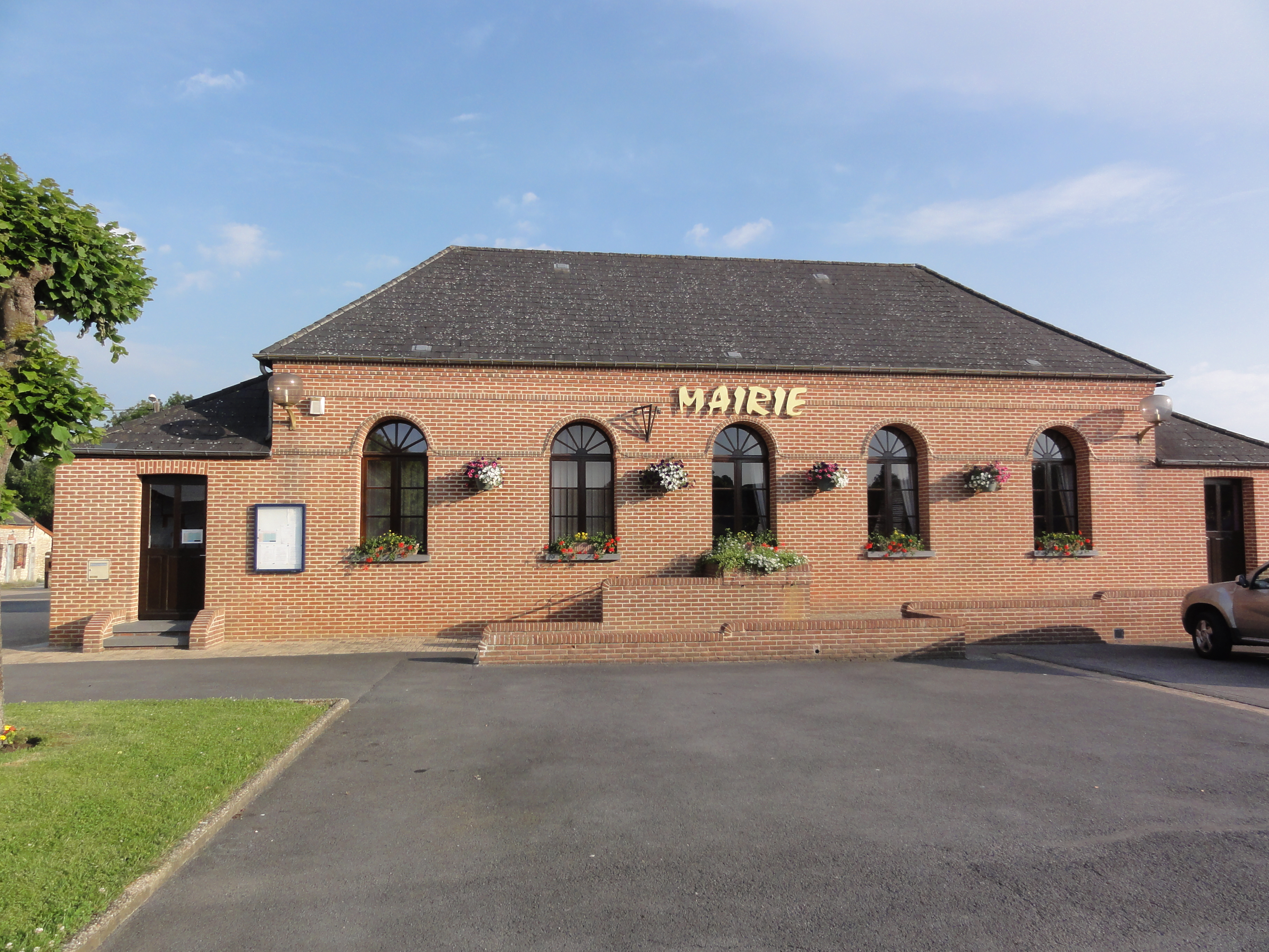 Buire (Aisne) mairie